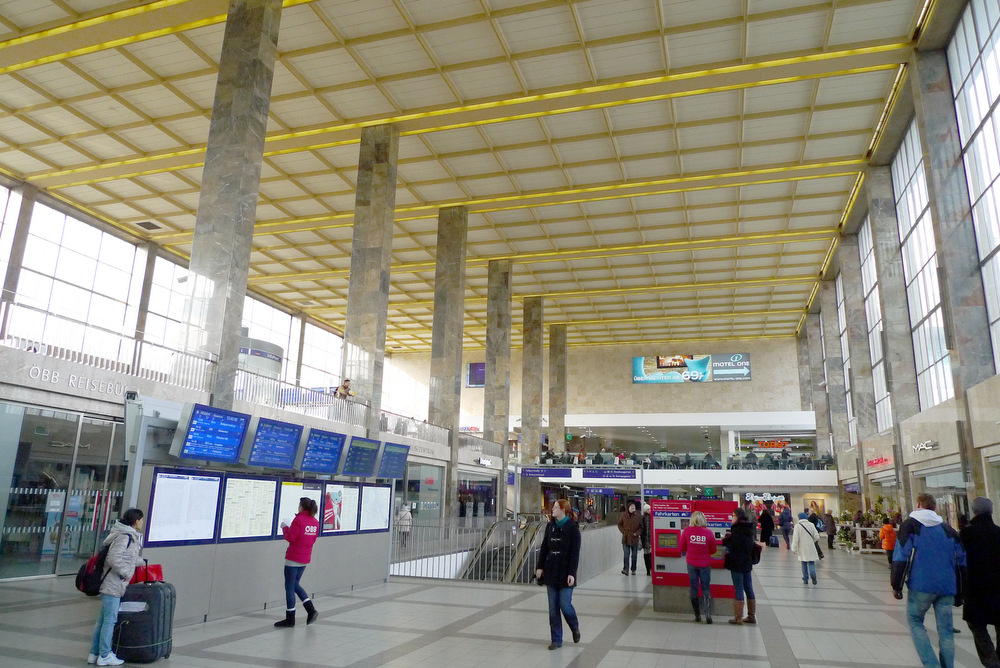 Westbahnhof untere Halle